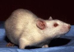 Albino rat. From